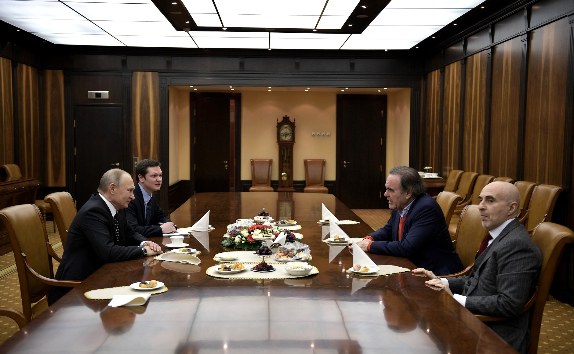 Встреча Президента России Владимира Путина с американским кинорежиссёром, сценаристом и продюсером Оливером Стоуном